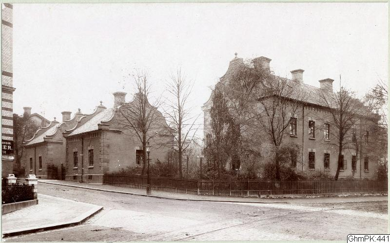 Svartvitt foto från hörnet Haga Kyrkogata 1 och Vasagatan 3, Lindströmska stiftelsens bostäder för "Pauvres Honteux". Husen byggdes 1875 och revs 1950. Pauvres honteux kommer från franskan och betyder blygsamma fattiga eller skamsna fattiga. Och betecknar tidigare välbeställda som hamnat på obestånd.